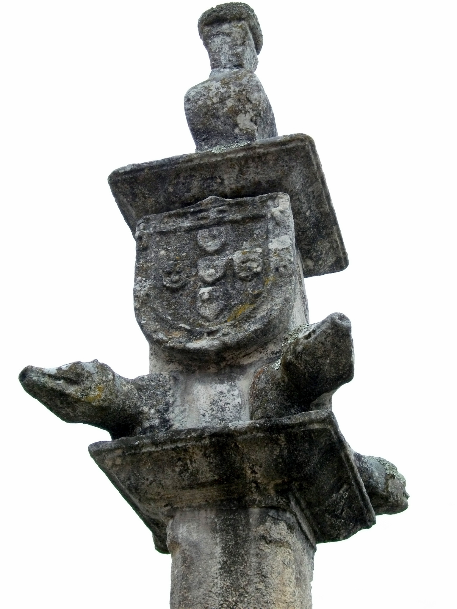 Pormenor do Pelourinho de Torre de Dona Chama, Mirandela, Portugal.